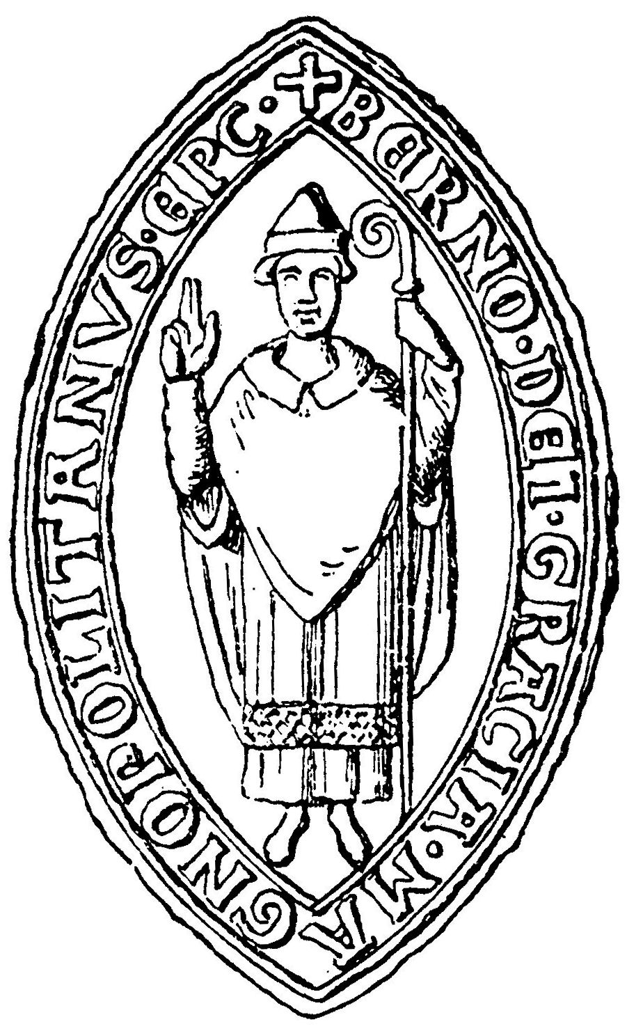 Siegel des Bischofs Berno von Mecklenburg († 1191)